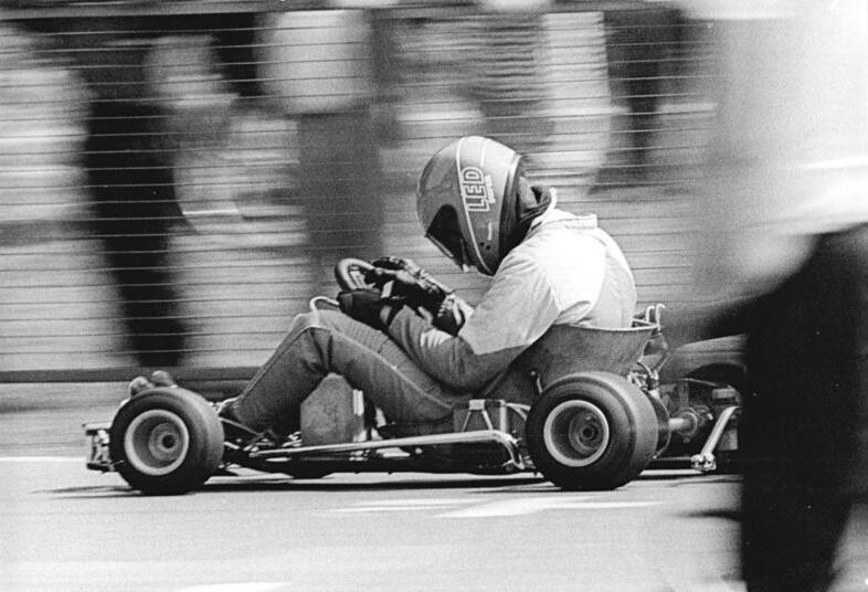 Cottbus, Kartrennen ADN-Weisflog 13.5.90- Cottbus: Tino Frühauf vom SC Fraureuth konnte sich bei den DDR-Meisterschaften der Junioren im Kartsport in der 150-ccm-Klasse wertvolle Punkte holen.